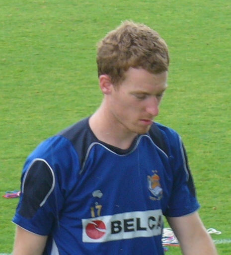 David Zurutuza en Zubieta